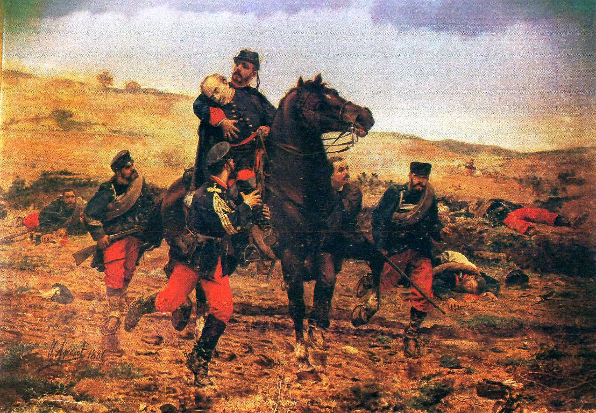 La obra representa la muerte de Manuel Gutiérrez de la Concha e Irigoyen (1808-1874), marqués del Duero, durante la batalla de Montemuro, librada el día 27 de junio de 1874, en el contexto de la Tercera Guerra Carlista. Su gran capacidad y prestigio militar hicieron que fuese considerado el mejor estratega del siglo XIX español, lo que llevó a que el gobierno de la Primera República Española le pusiera al mando, en 1874, del Tercer Cuerpo del Ejército del Norte para luchar contra los carlistas.